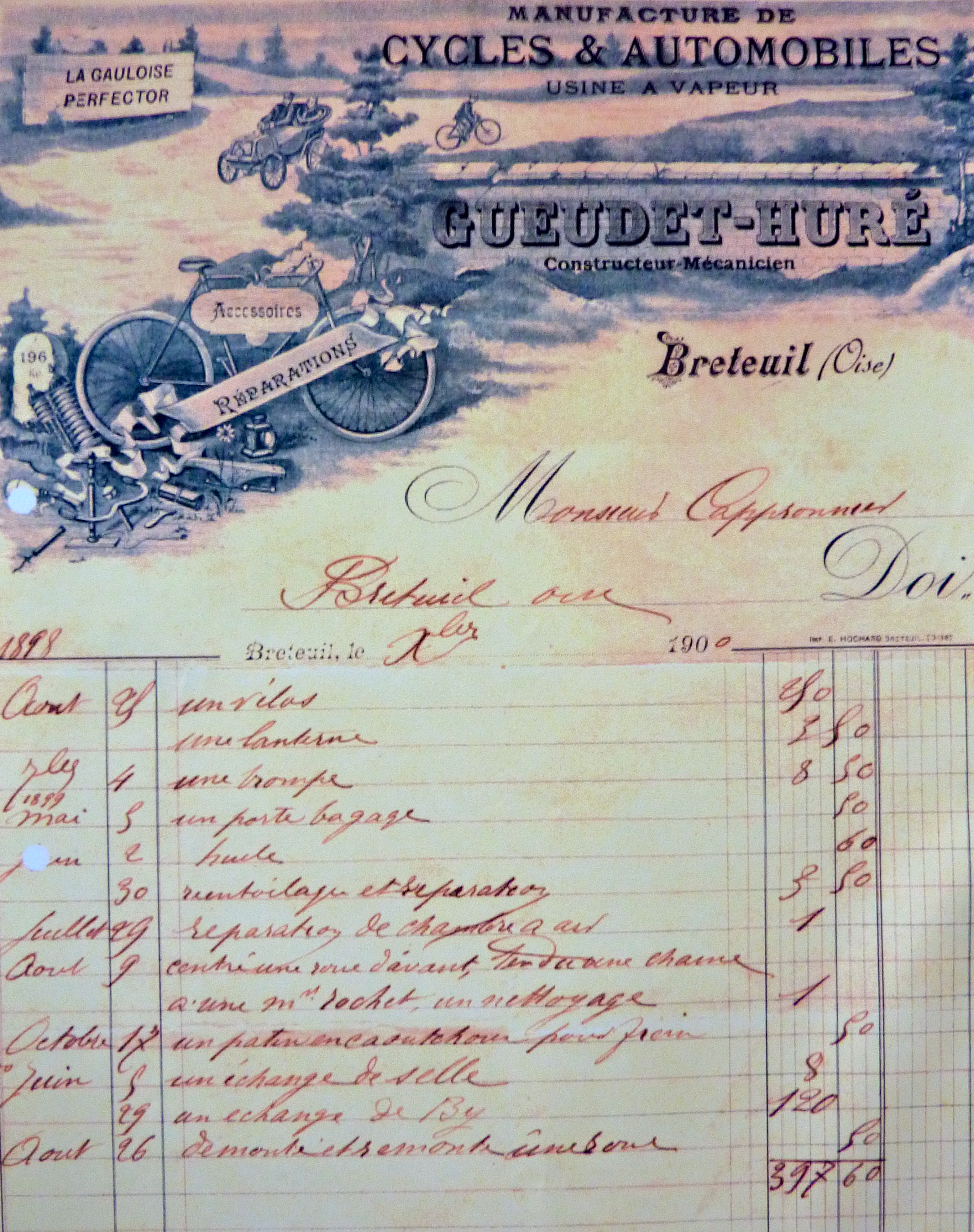 Fabrique de vélos et de machines à coudre